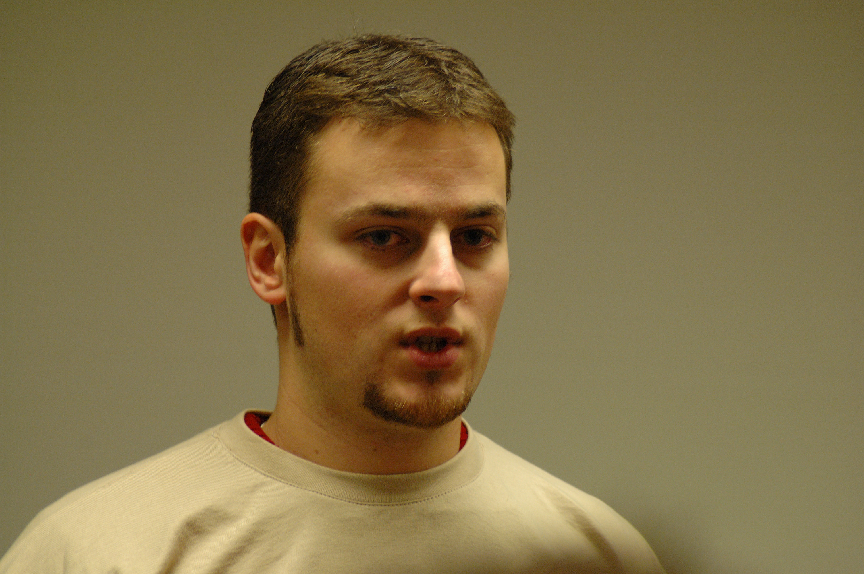 Damien Sandras, FOSDEM 2006